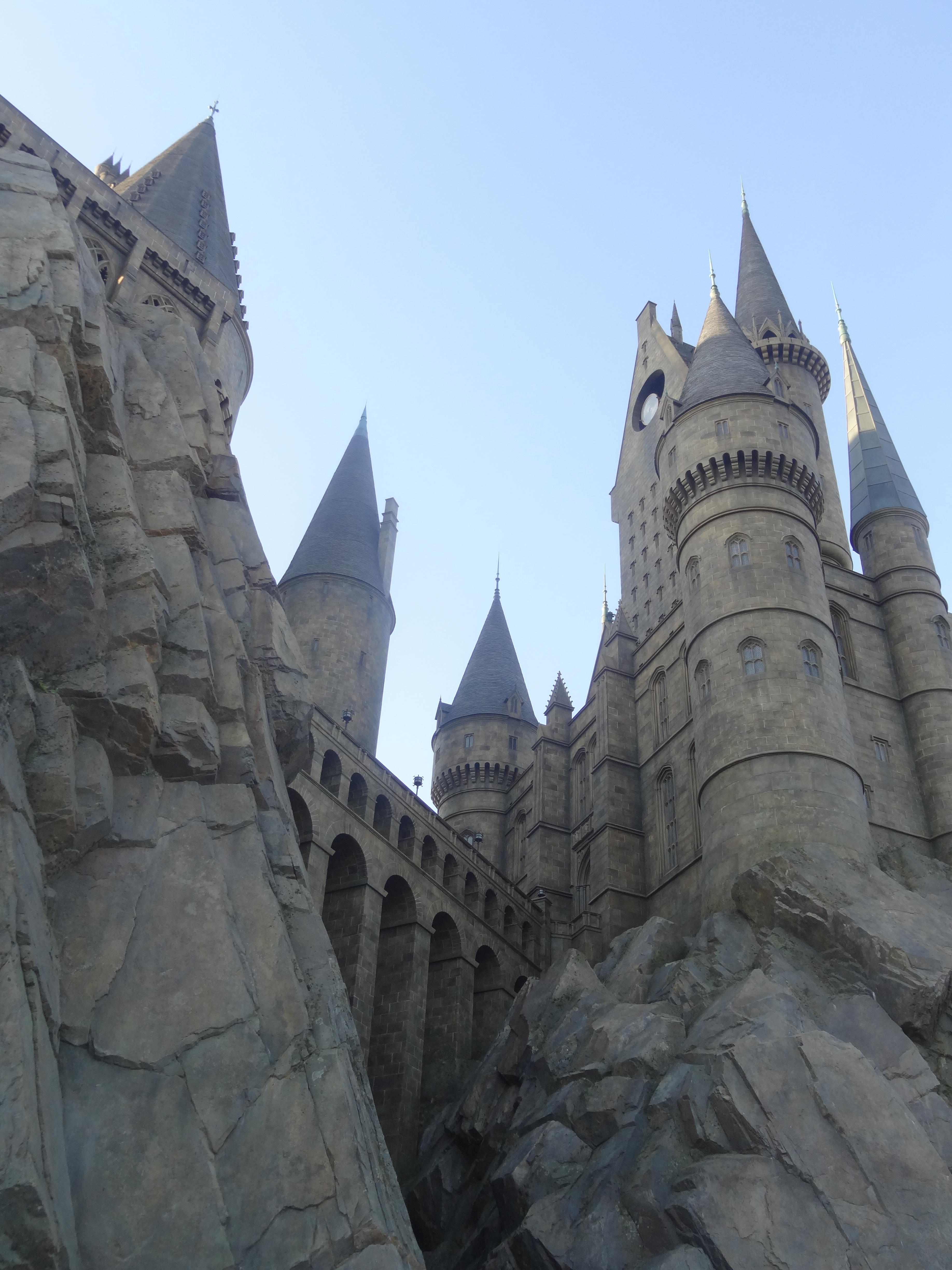 Château de Poudlard à Universal Studios Japan